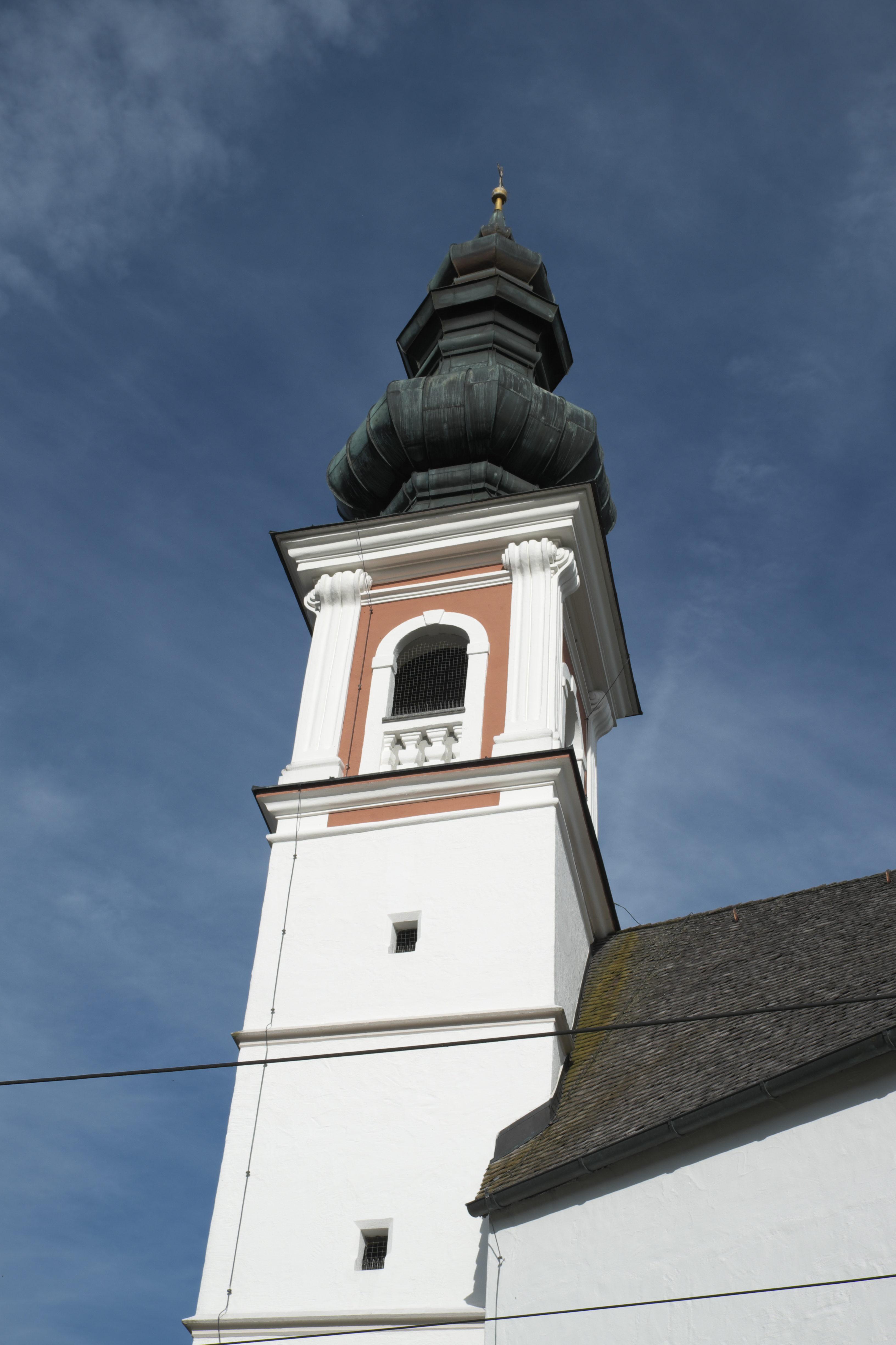 Katholische Filialkirche St. Rupertus in Gaden (Waging am See) im Landkreis Traunstein (Bayern/Deutschland), Turm